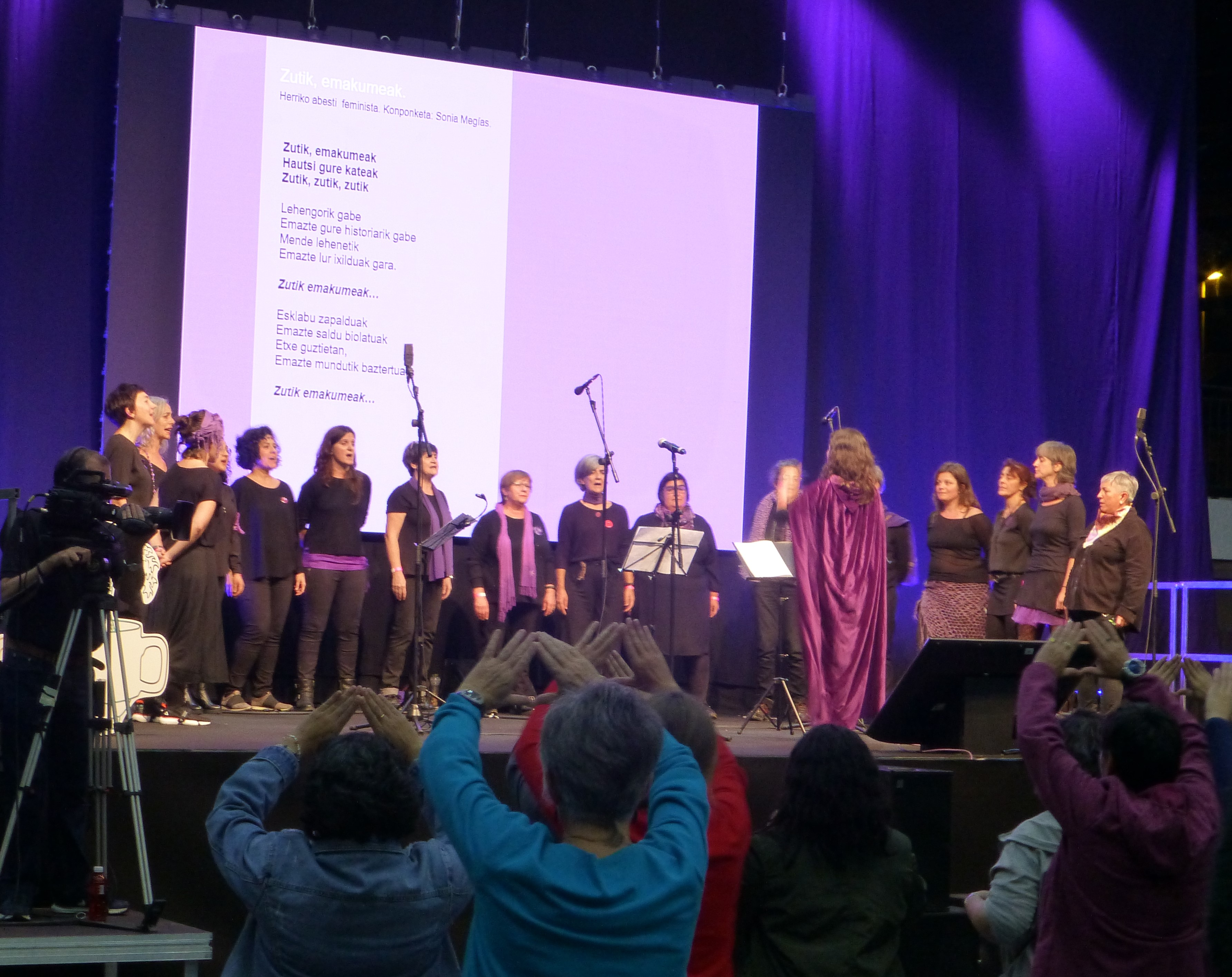 La Kora (Bilbo) emakume feministek osaturiko abesbatza da.Durangon Euskal Herriko V. Jardunaldi Feministetanabestu zuten.